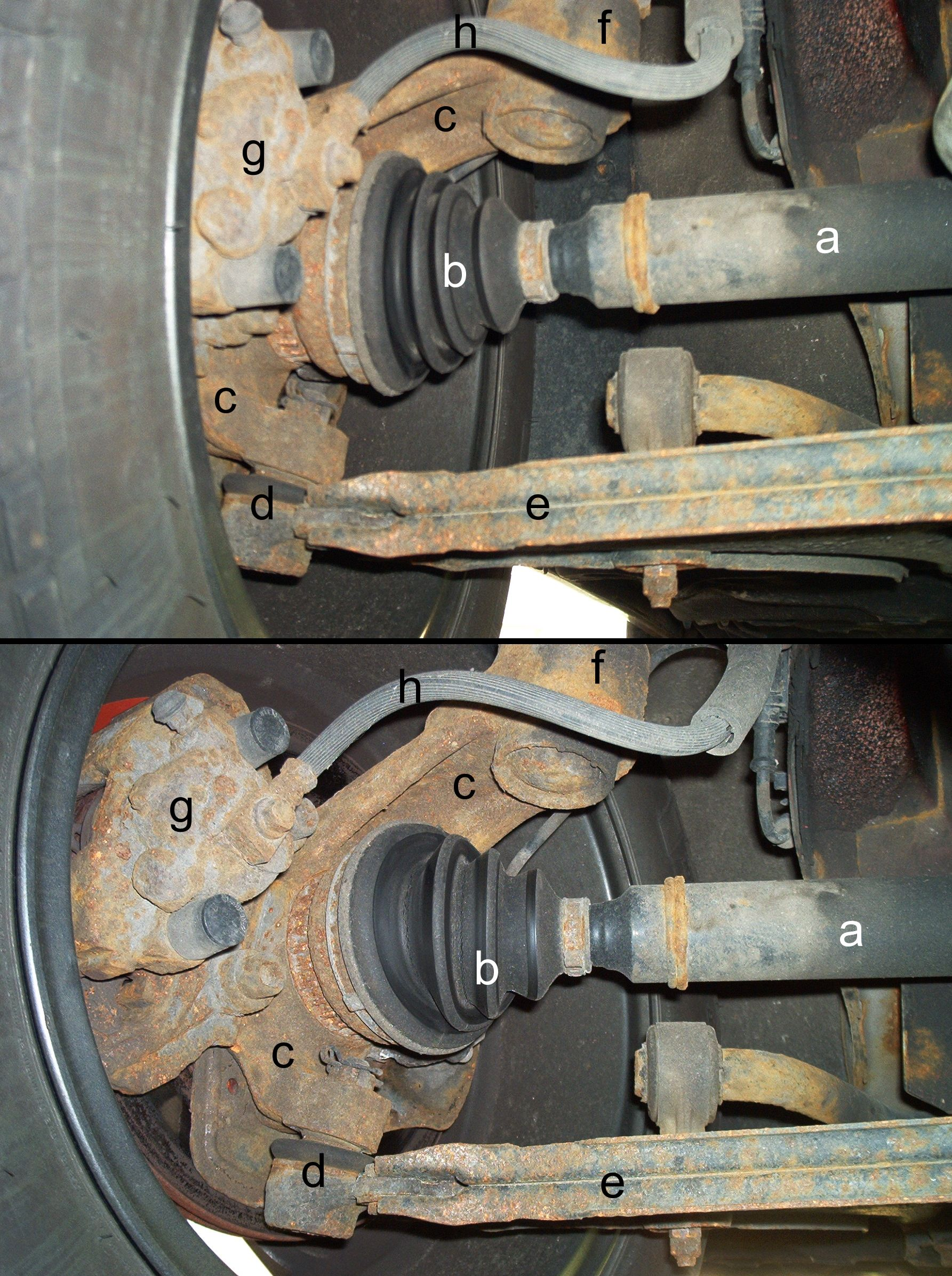 PKW angetriebene Vorderachse/rechts, Ansicht von vorne a) Gelenk- / Antriebswelle b) Achsmanschette c) Achsschenkel d) Führungsgelenk e) Querlenker f) Federbein g) Bremssattel h) Bremsdruckschlauch (Bremsschlauch - flexibel, um den Lenk- und Federbewegungen folgen zu können)